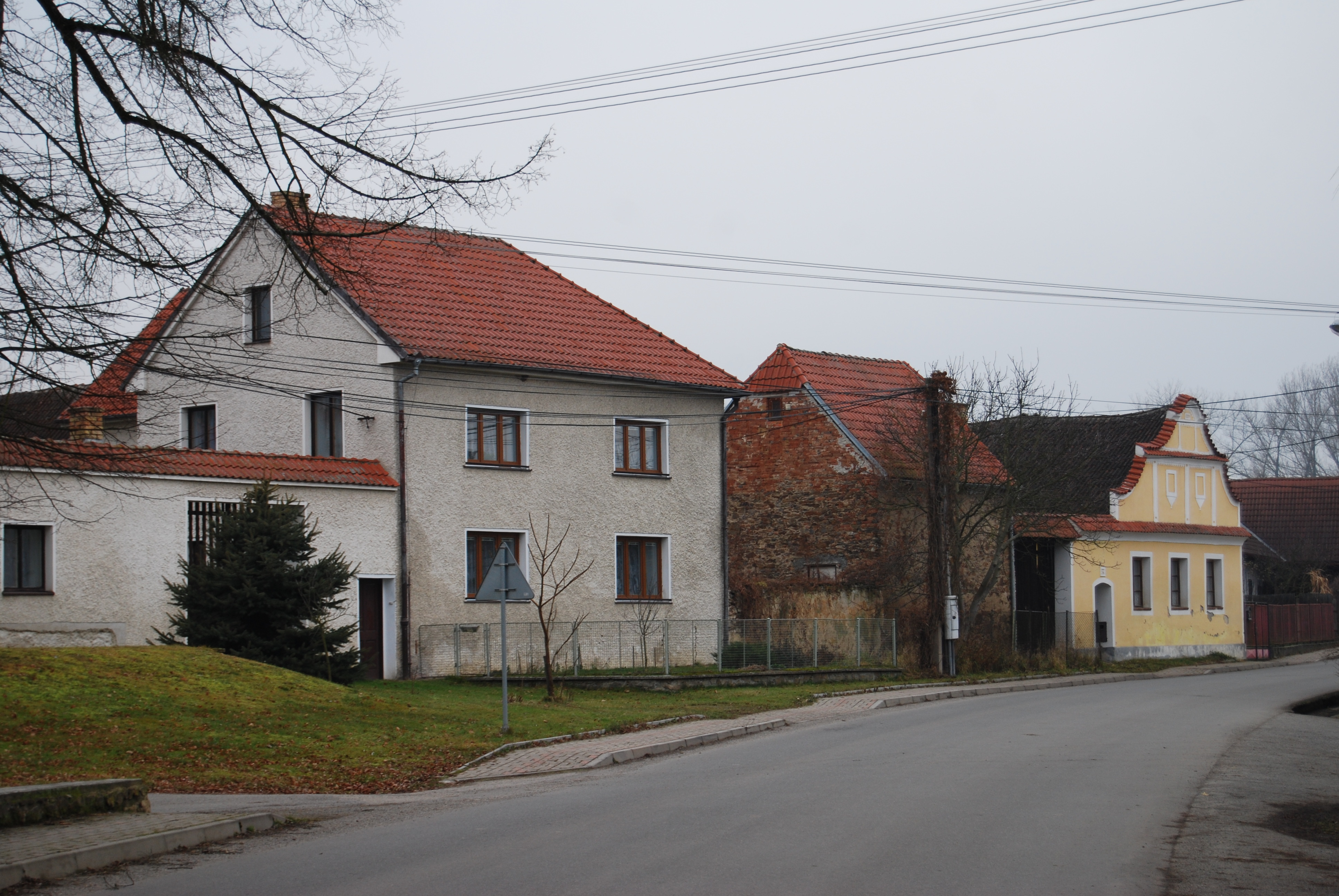 Pohled na část obce od pomníku padlým. Radětice (okres Tábor). Česká republika. - OpenStreetMap (Info)